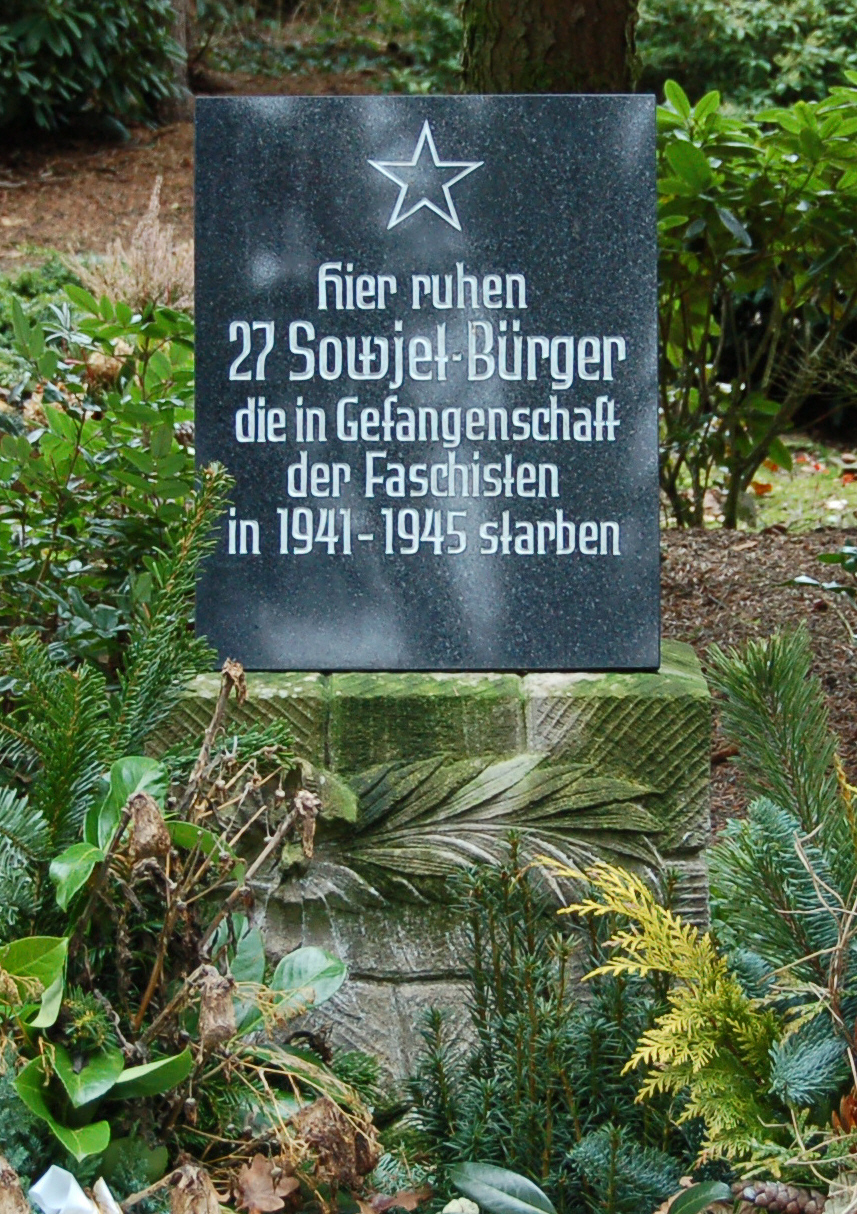 Gedenkstein an die 27 Sowjet-Bürger die in der Gefangenschaft der Faschisten in Uetersen starben.